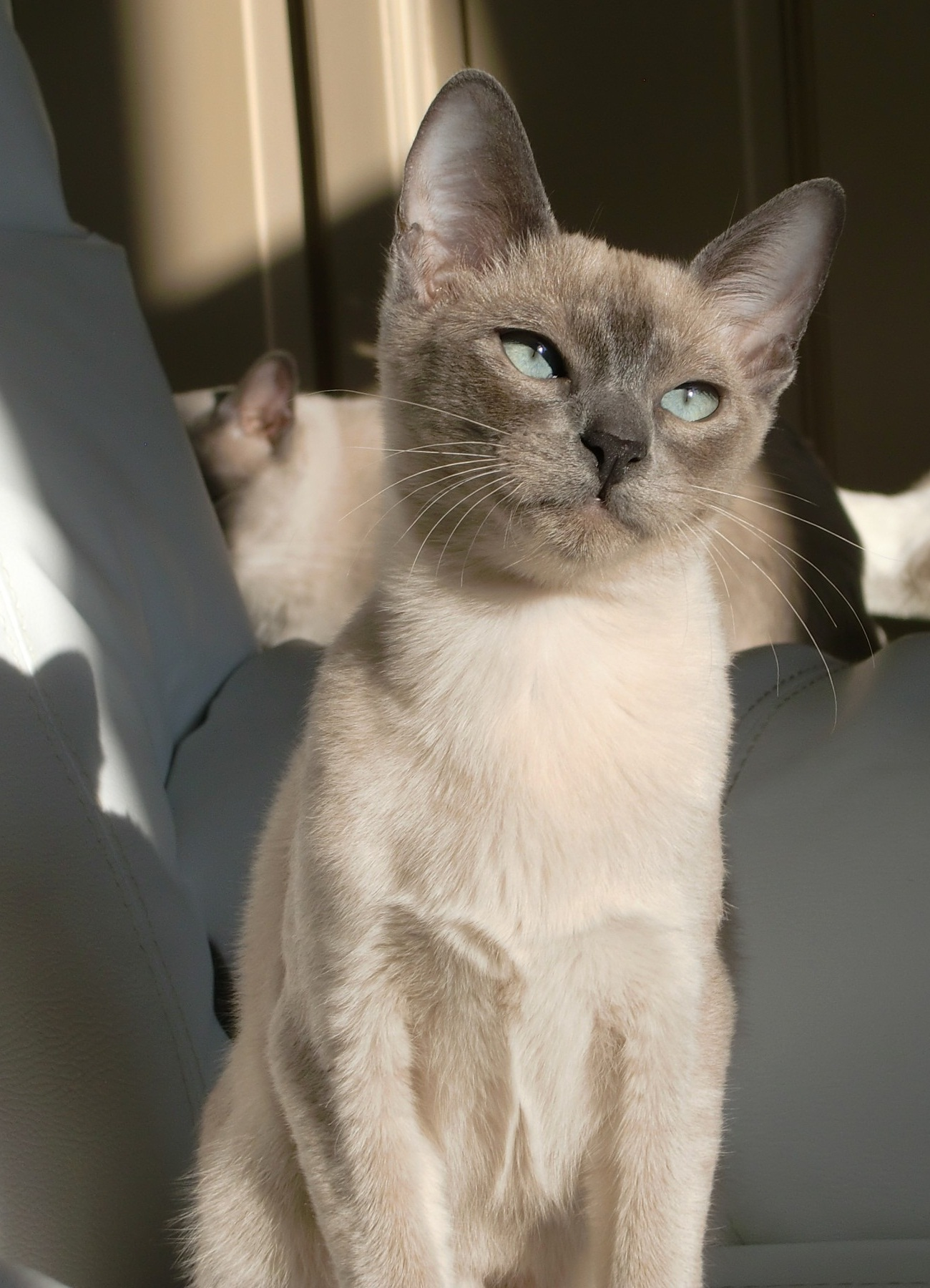 Chatons tonkinois blue mink (chatterie de l'Esprit d'Edenvane)